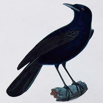 Plate 17 from Voyage autour du monde, exécuté par Ordre du Roi, Sur la Corvette de Sa Majesté, La Coquille, pendant les années 1822, 1823, 1824 and 1825 (7 vols. Arthus Bertrand, Paris) By Louis Isidore Duperrey & René-Primevère Lesson (1825-1830).